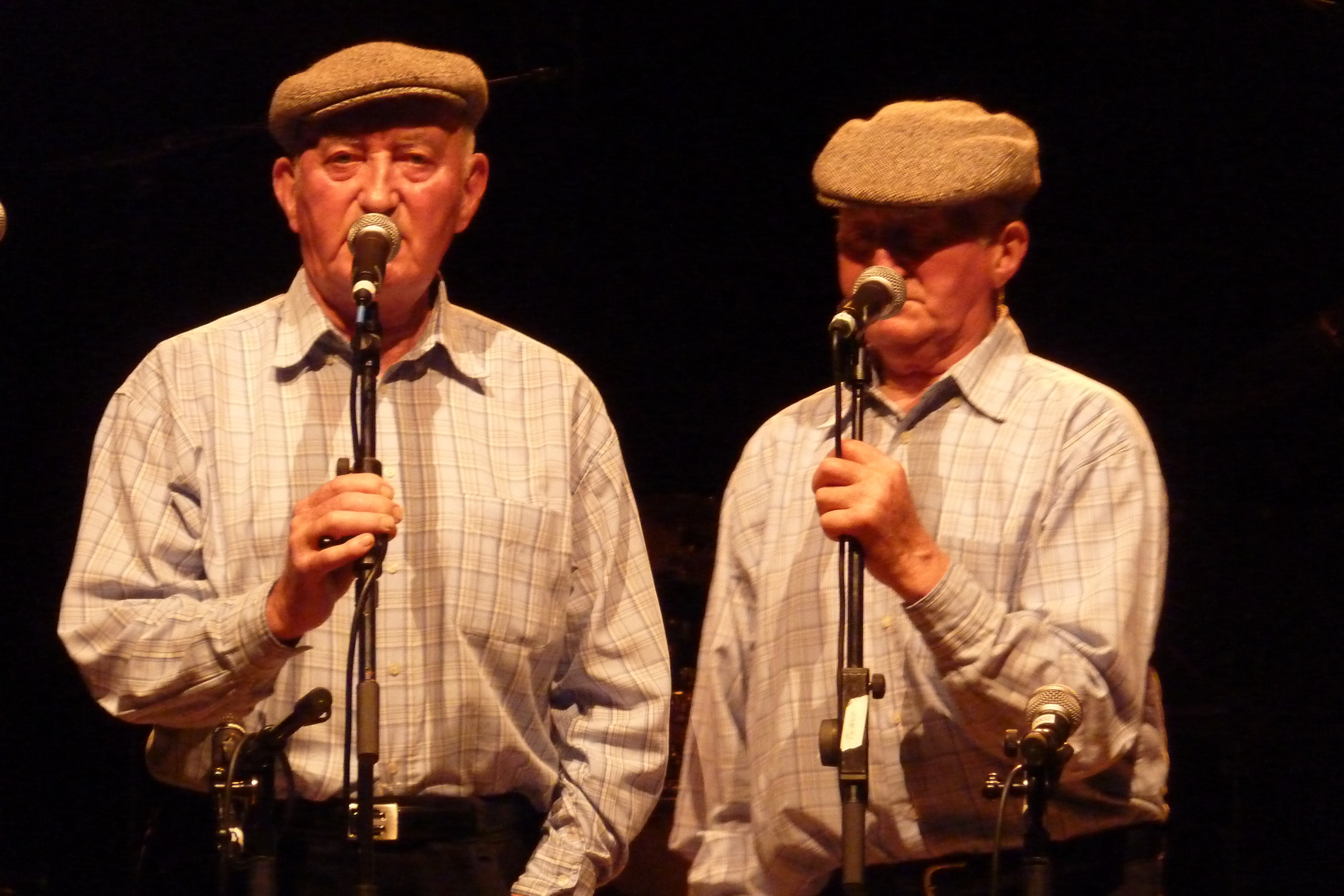 Pont Croix - Mouez ar Gelted - Fest Noz - Frères Morvan